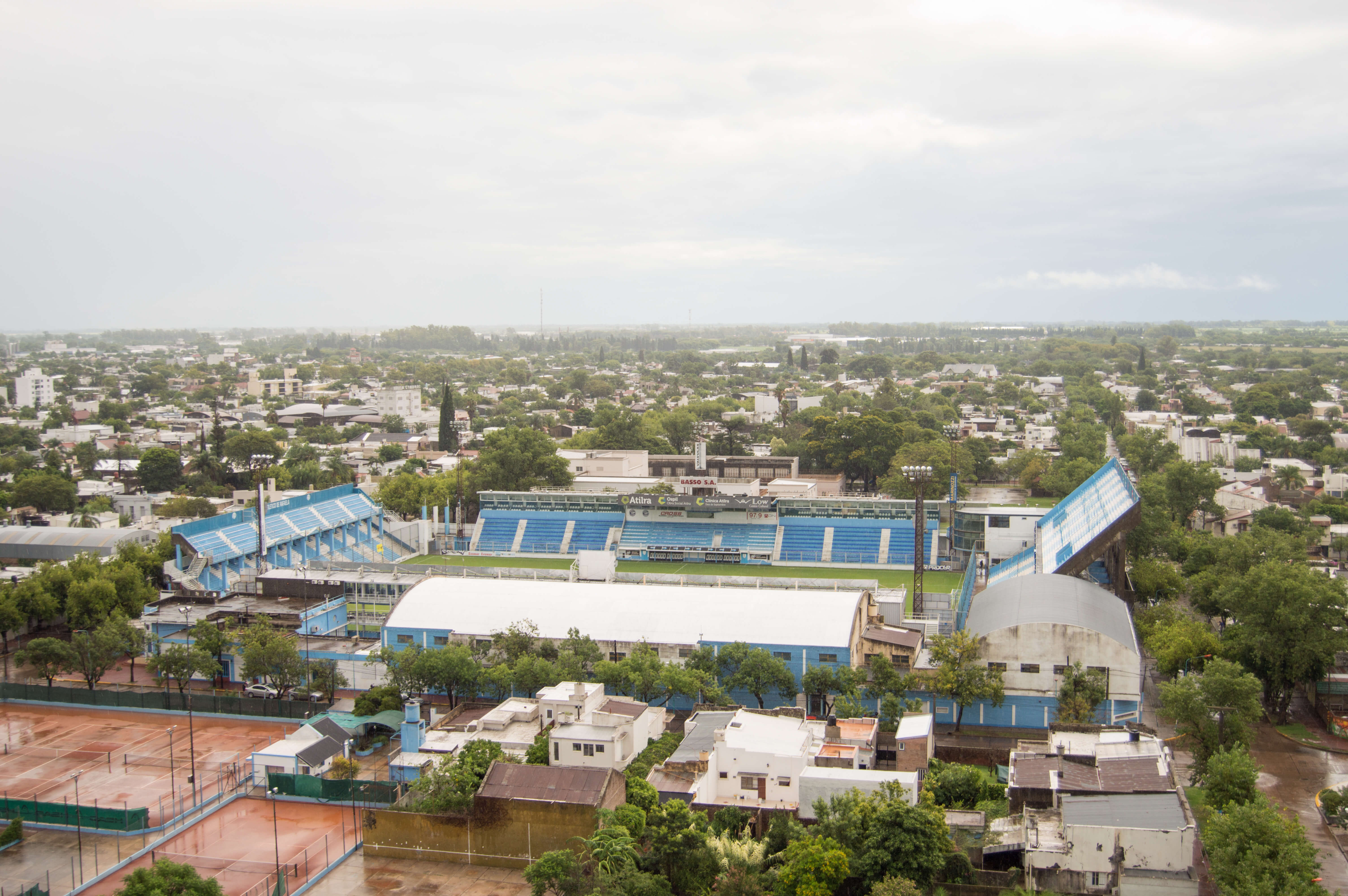 Vista aerea del Estadio Nuevo Monumental de Atletico de Rafaela.